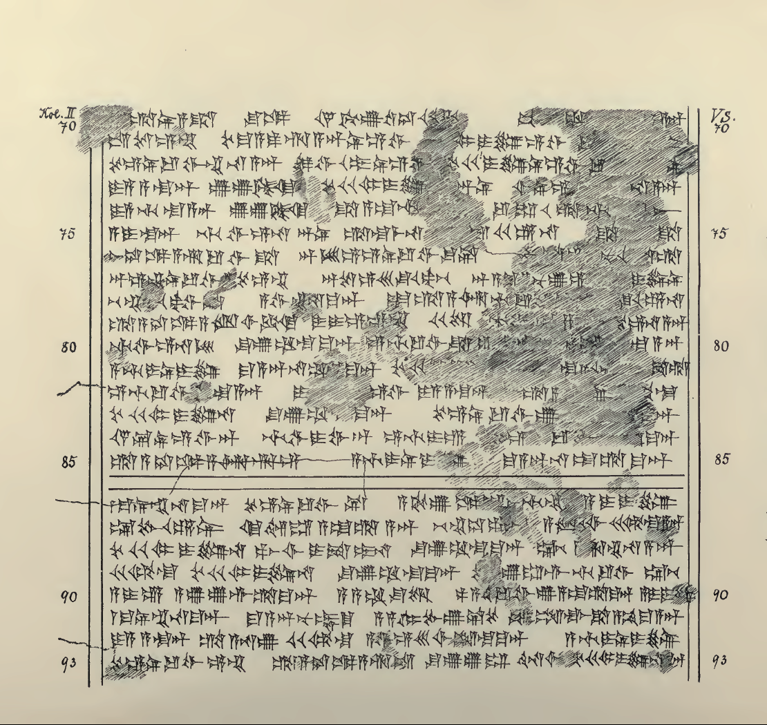 List Tuszratty do Amenhotepa III w języku huryckim – autografia.